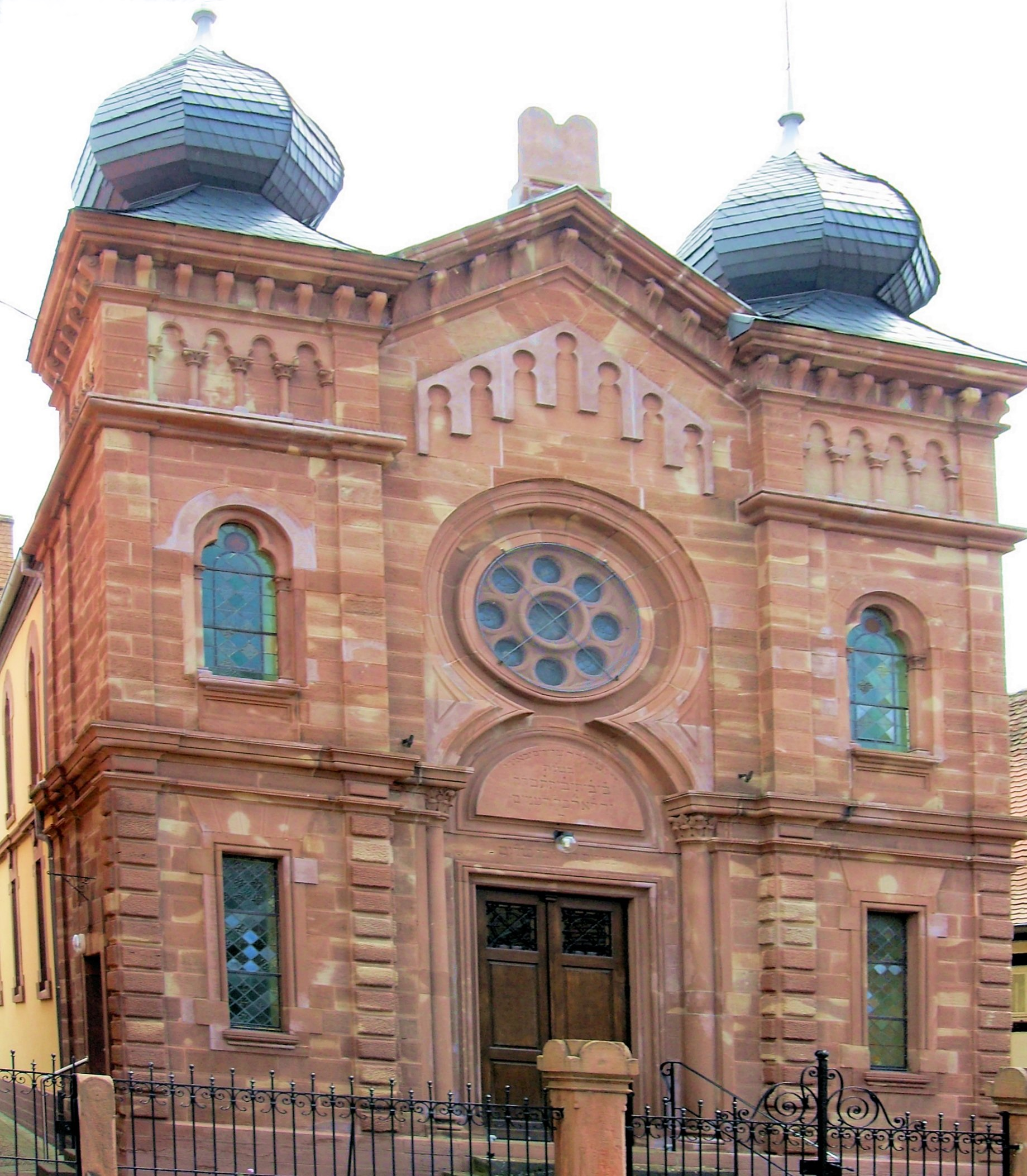 Synagogue de Wolfisheim